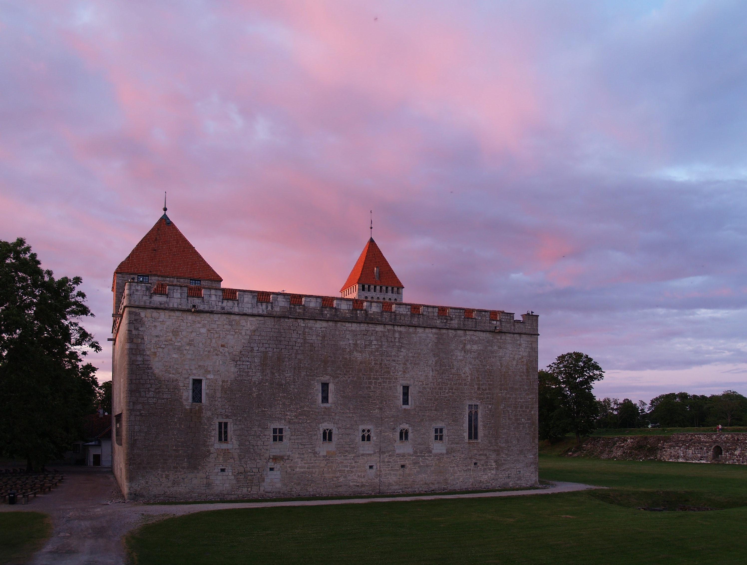 Kuressaare linnus